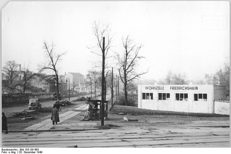 Zentralbild 28.12.1949 Berlin 1949 Die Weberwiese im Bezirk Friedrichshain UBz: Die Weberwiese, mit Blick auf die Marchlewski-Straße.